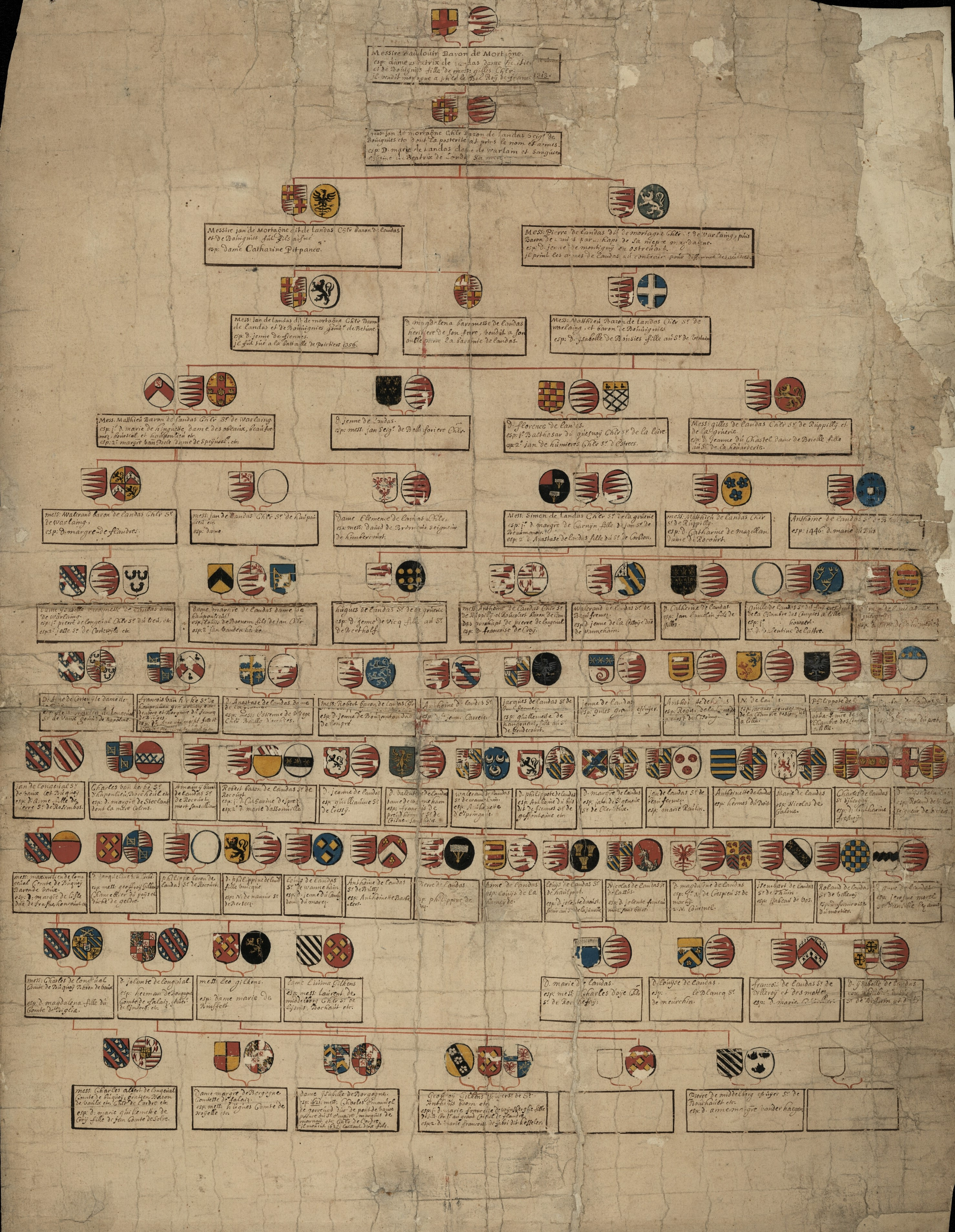 Stamboom van de familie de Landas. Gemaakt in de 17e eeuw.